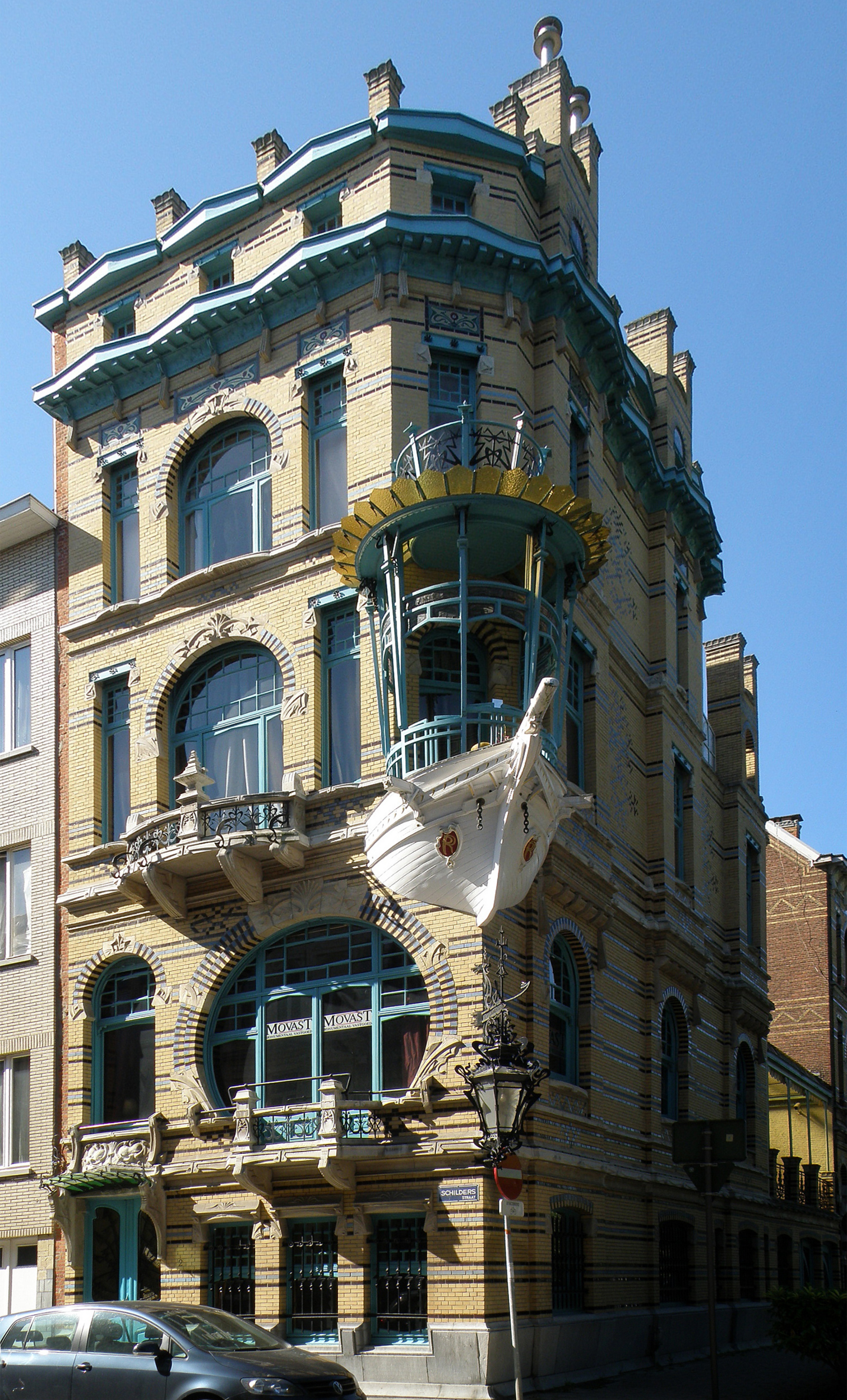 Antwerpen, district Antwerpen, wijk Zuid. Art nouveau-huis, genaamd "'t Bootje", aan de Schildersstraat nr. 2 (hoek Schildersstraat/Plaatsnijdersstraat). Ontwerp van archit. Frans Smet-Verhas uit 1901. Vgl. verder Inventaris Bouwkundig Erfgoed.